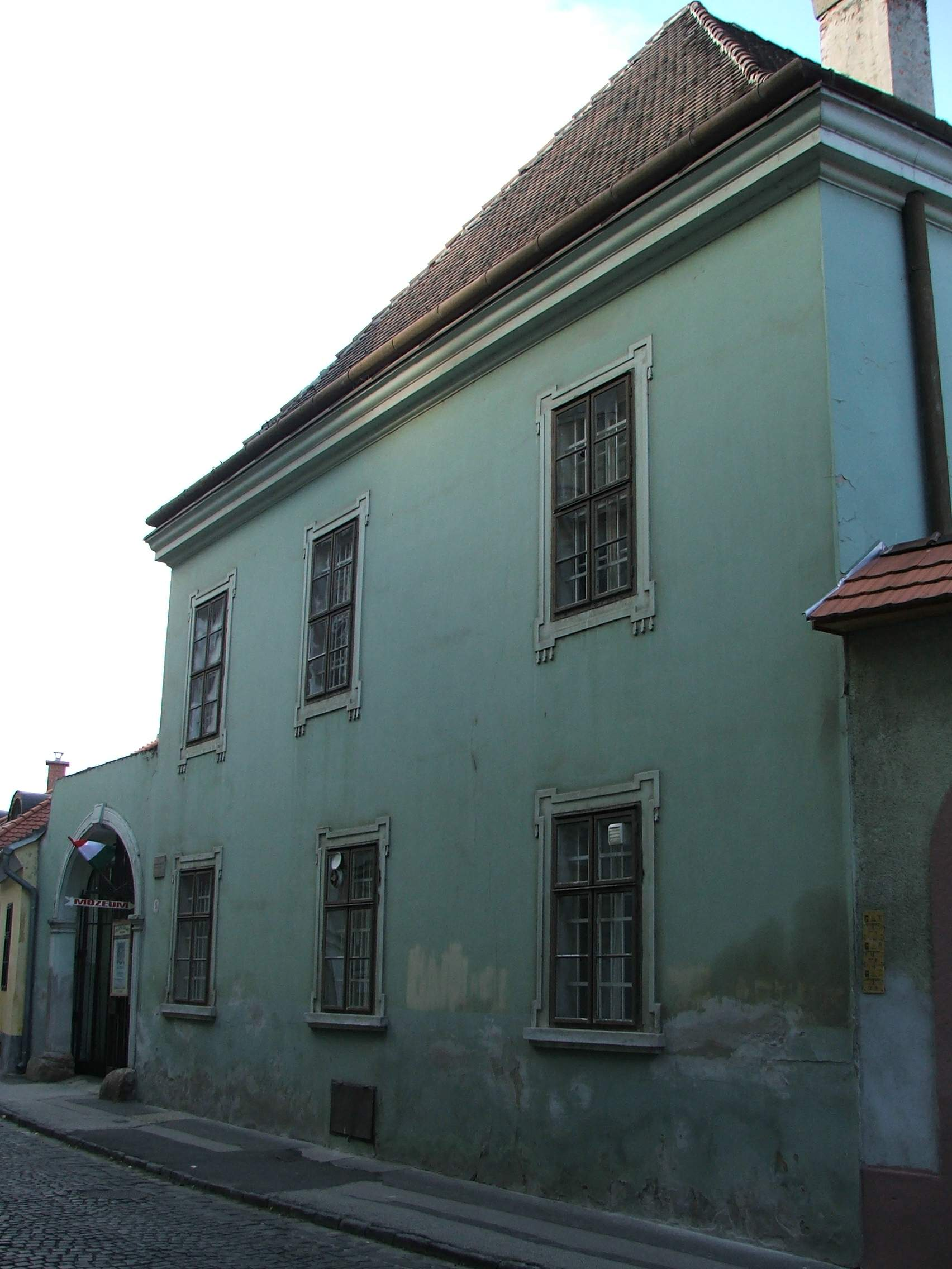 A volt vármegyeháza, Esztergom-Víziváros, ma Balassa Bálint Múzeum